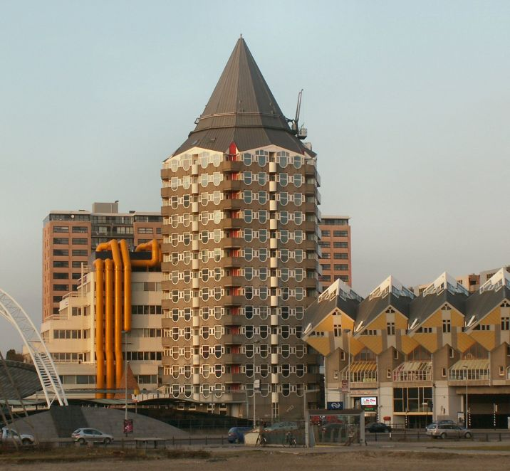 De oude opname (met zelfde naam, maar dan zonder de 2) gedownload en toren rechtgezet (deze stond namelijk scheef), vervolgens teruggeplaatst